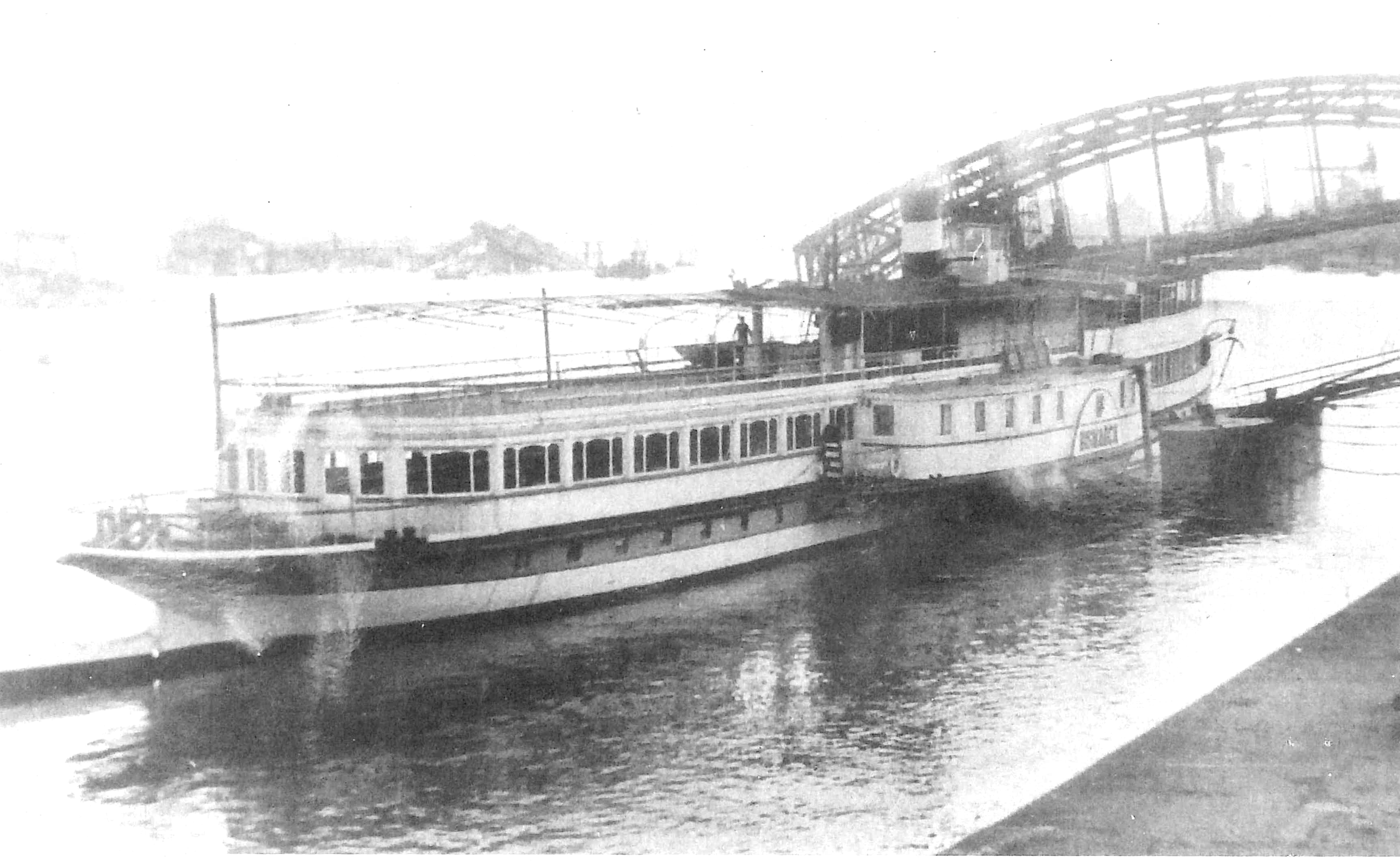 Der Raddampfer Bismarck als Hotelschiff vor der Kölner Hohenzollernbrücke liegend (1946)